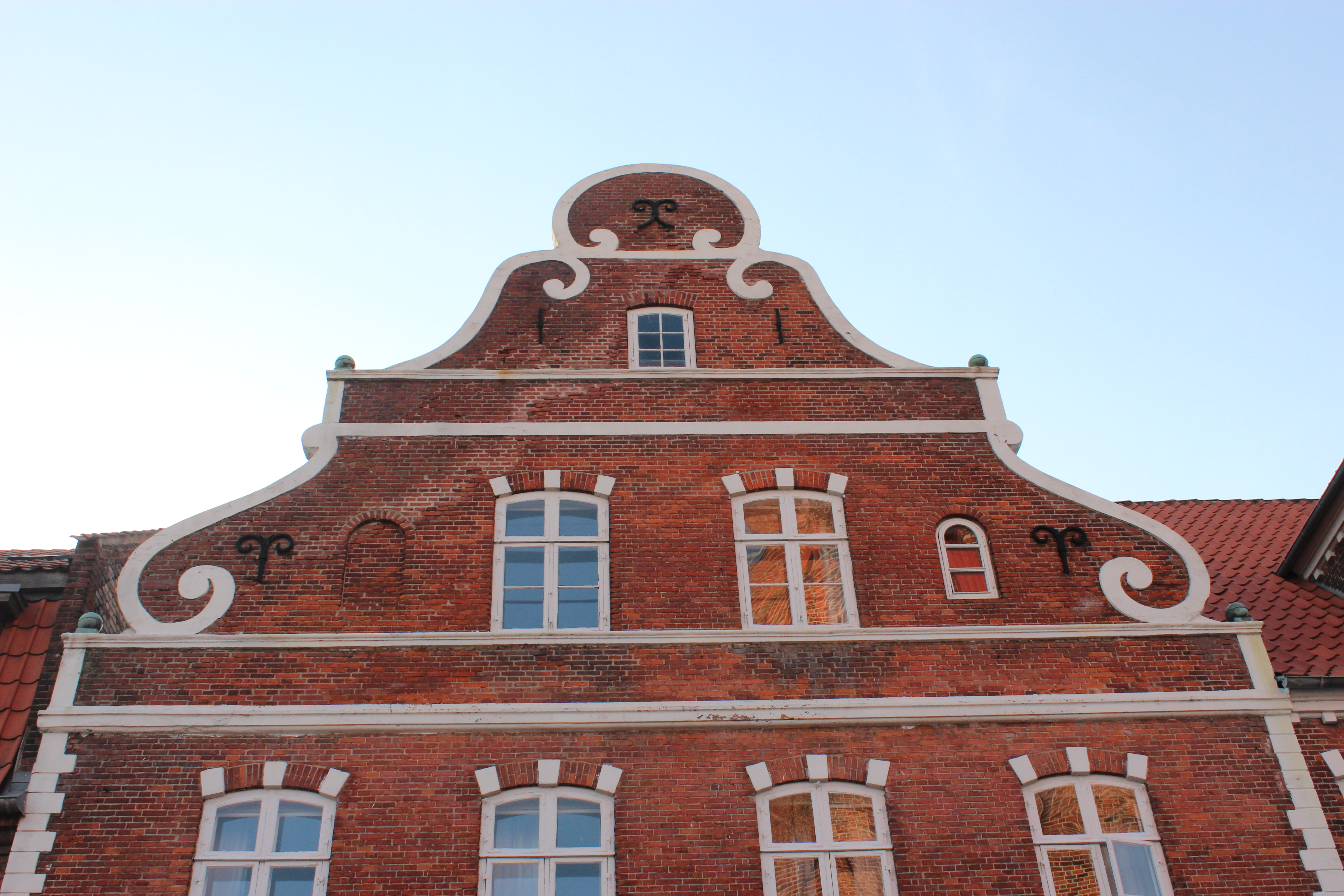 Facaden på den sydlige del af bygningen. I Rosenborgstil.